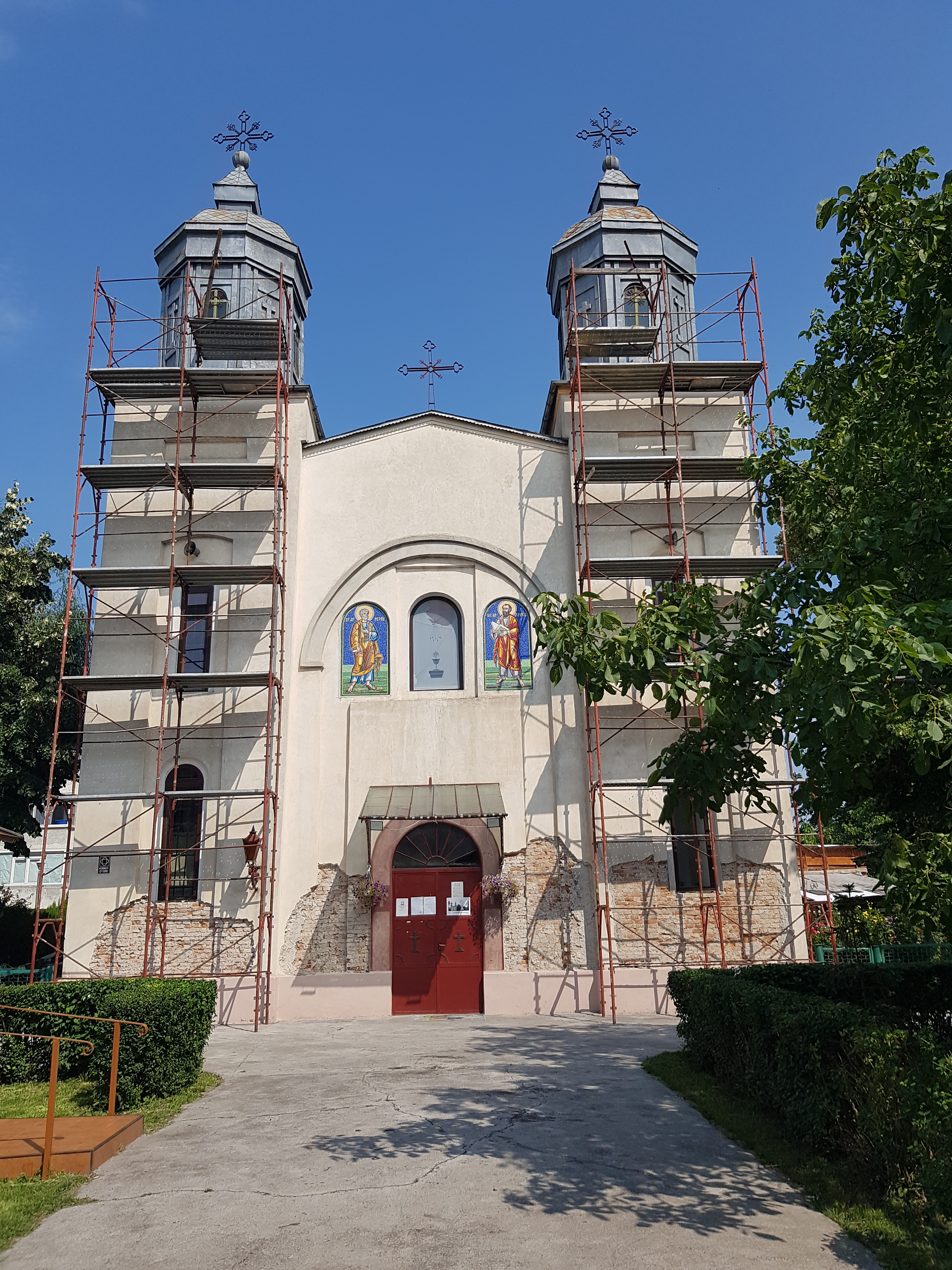 Biserica „Sf. Apostoli” de la Ocol